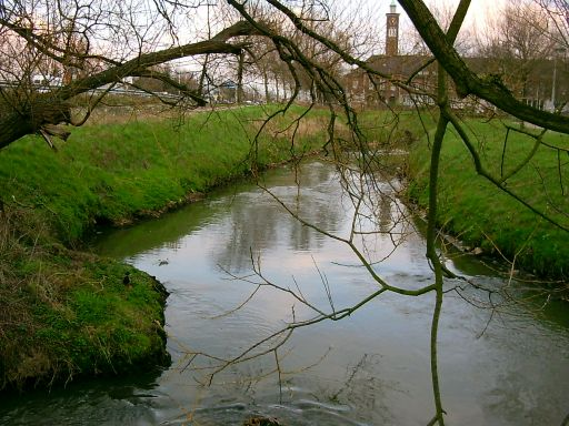 Demer (26032004) te Hasselt. Eigen foto. Paul Hermans 25 mrt 2004 00:25 (CET)